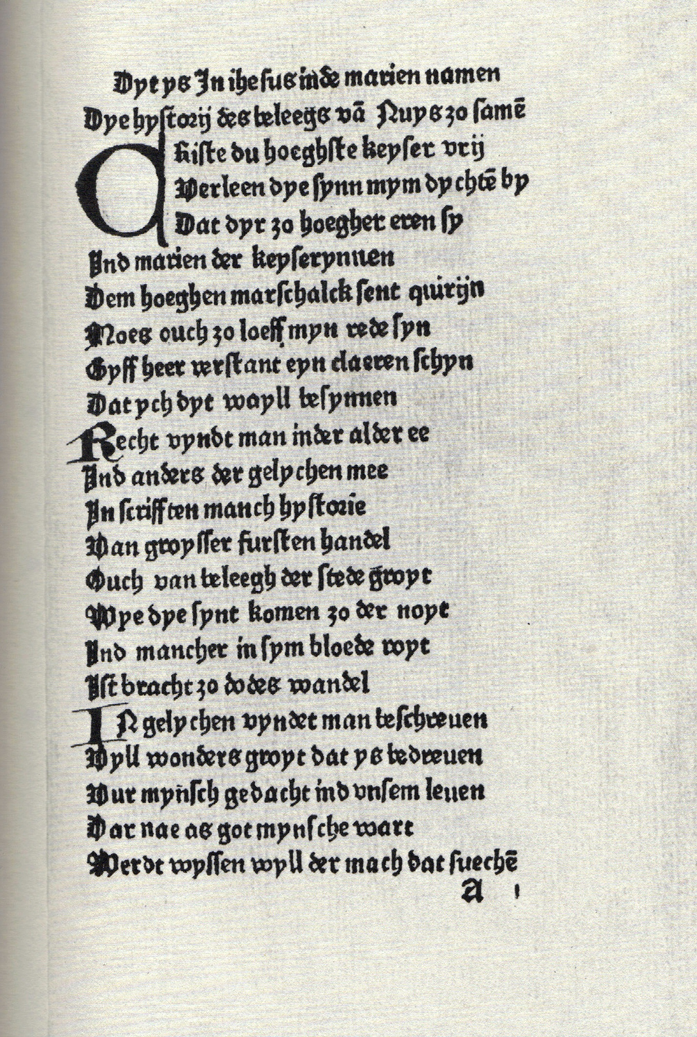 Textbeginn der Wierstraat-Inkunabel